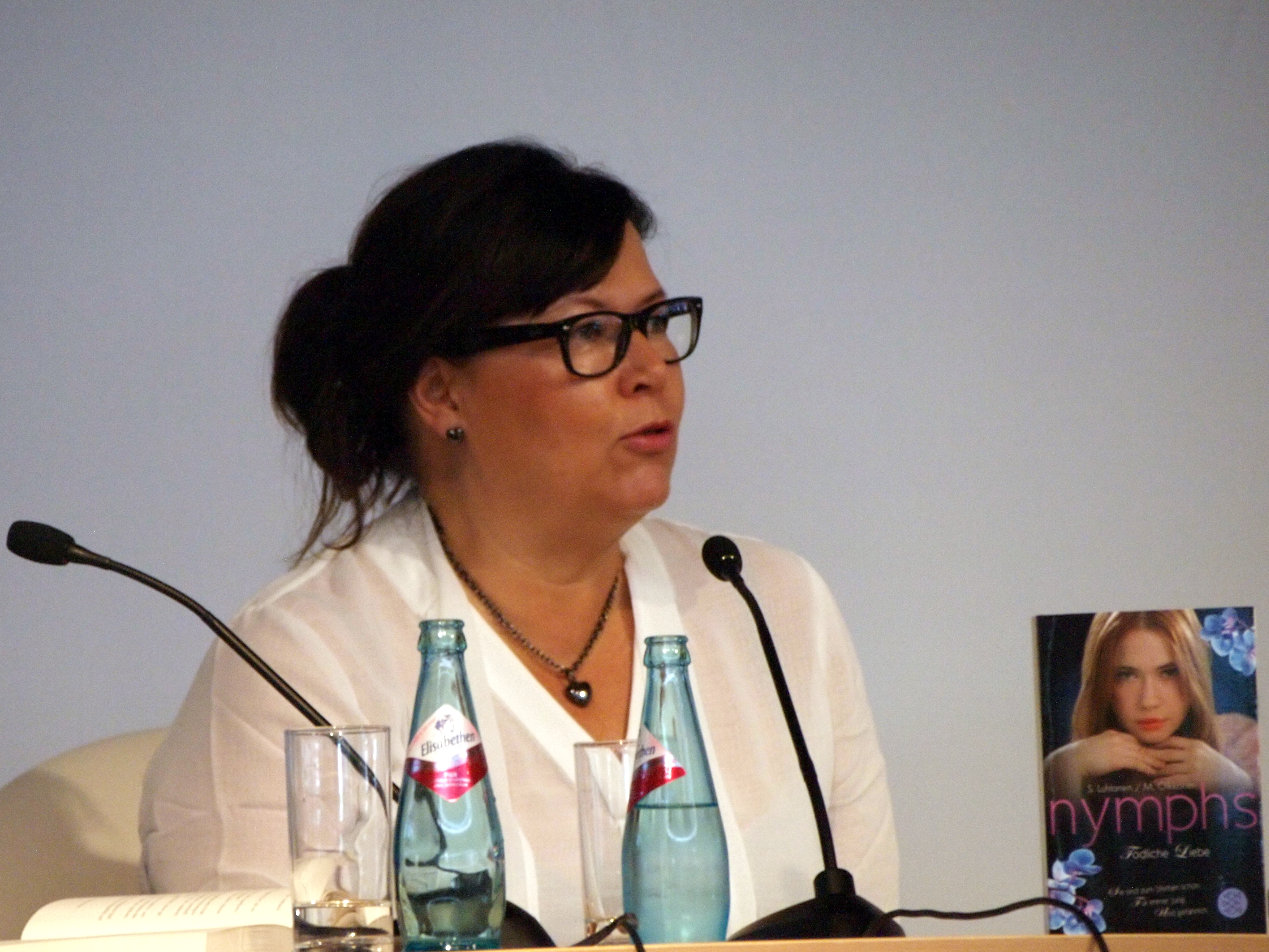 Sari Luhtanen auf der Frankfurter Buchmesse 2014